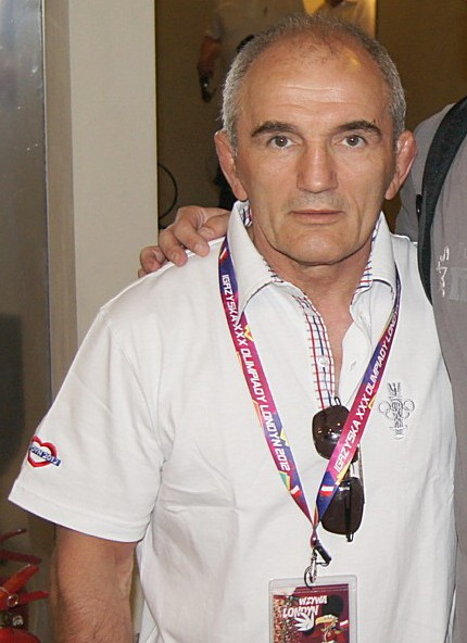 Władysław Stecyk, polish wrestler.